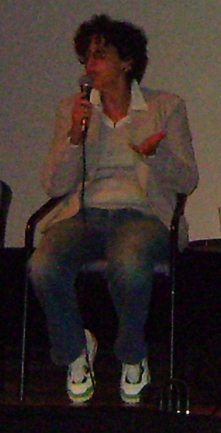 Malu de Martino, cineasta brasileira.